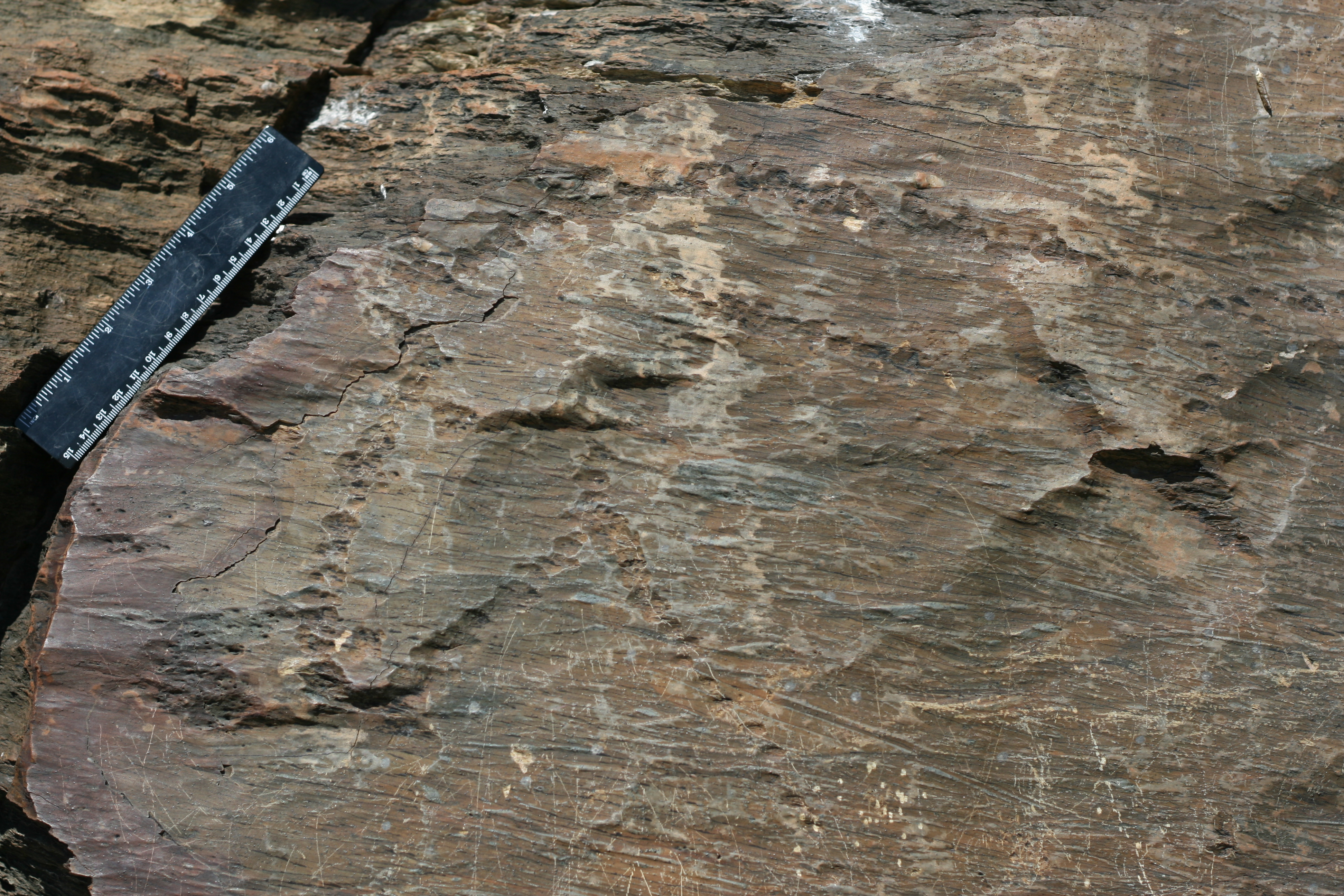 Estación de arte rupestre al aire libre de Domingo García. En este yacimiento se han identificado grabados desde el Paleolítico hasta la era moderna.